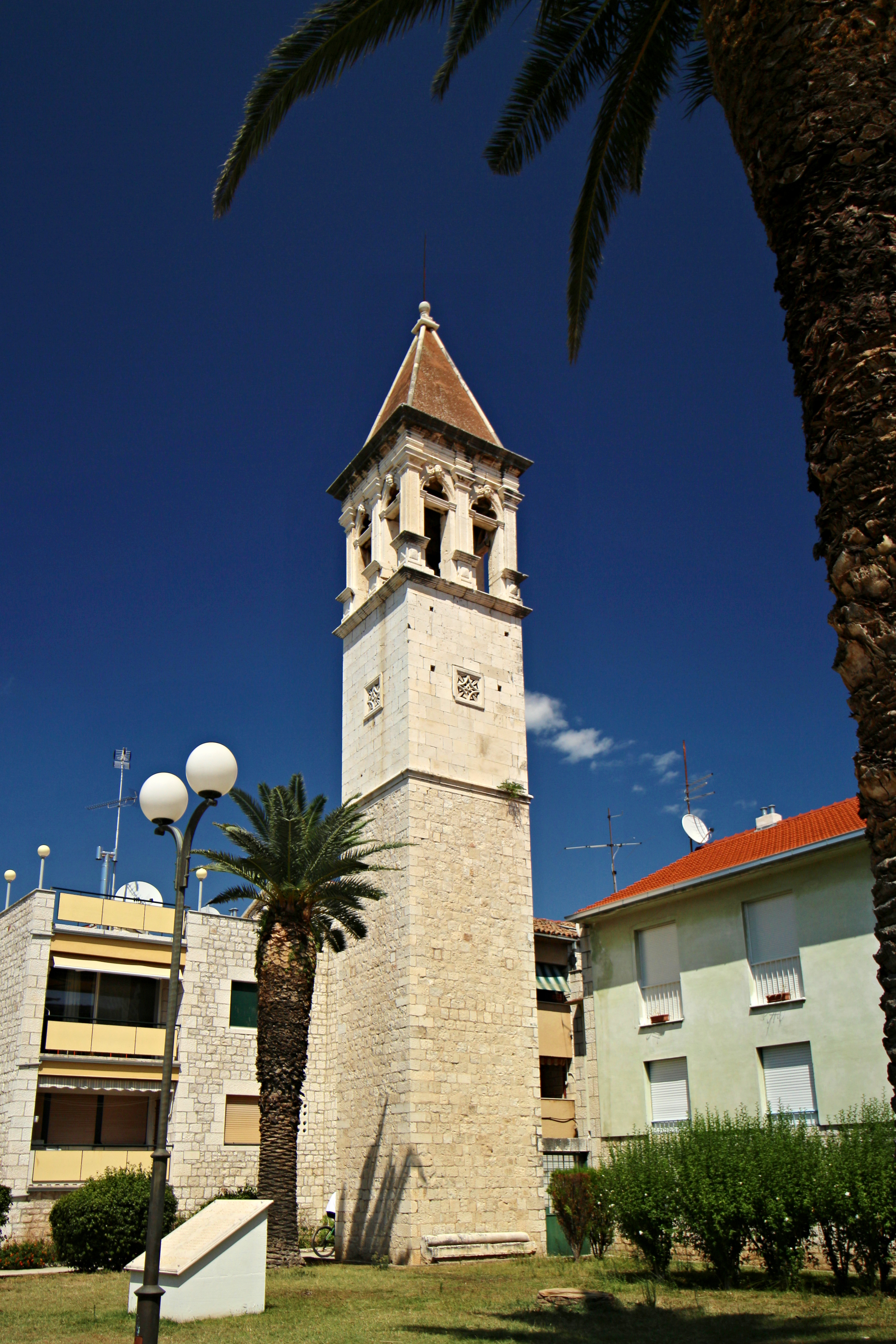 Trogir věž kostela sv. Michala